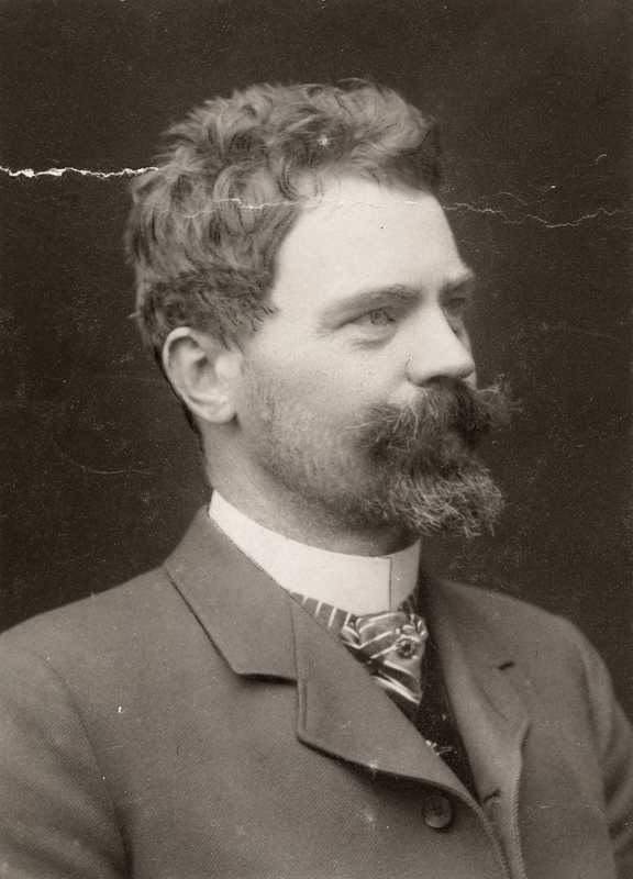 Ingvar Kristensen (born 8 March 1865 in Søgne and died 9 May 1947 in Oslo) was a Norwegian engineer, Waterfall Director of the Channel administration, Water Resources Director of Water resources judiciary and Waterfall Director at Waterfall Directorate at Norwegian Water Resources and Electricity administration.